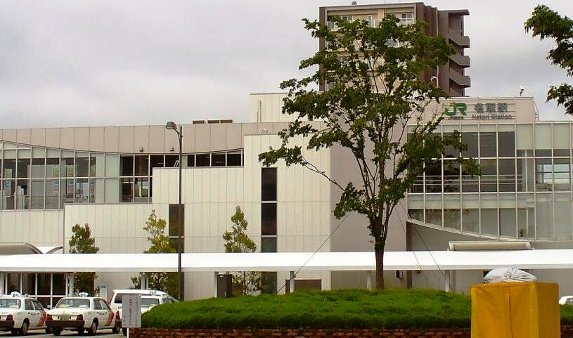 名取駅（東口）Natori Station. East Japan Railway Co.